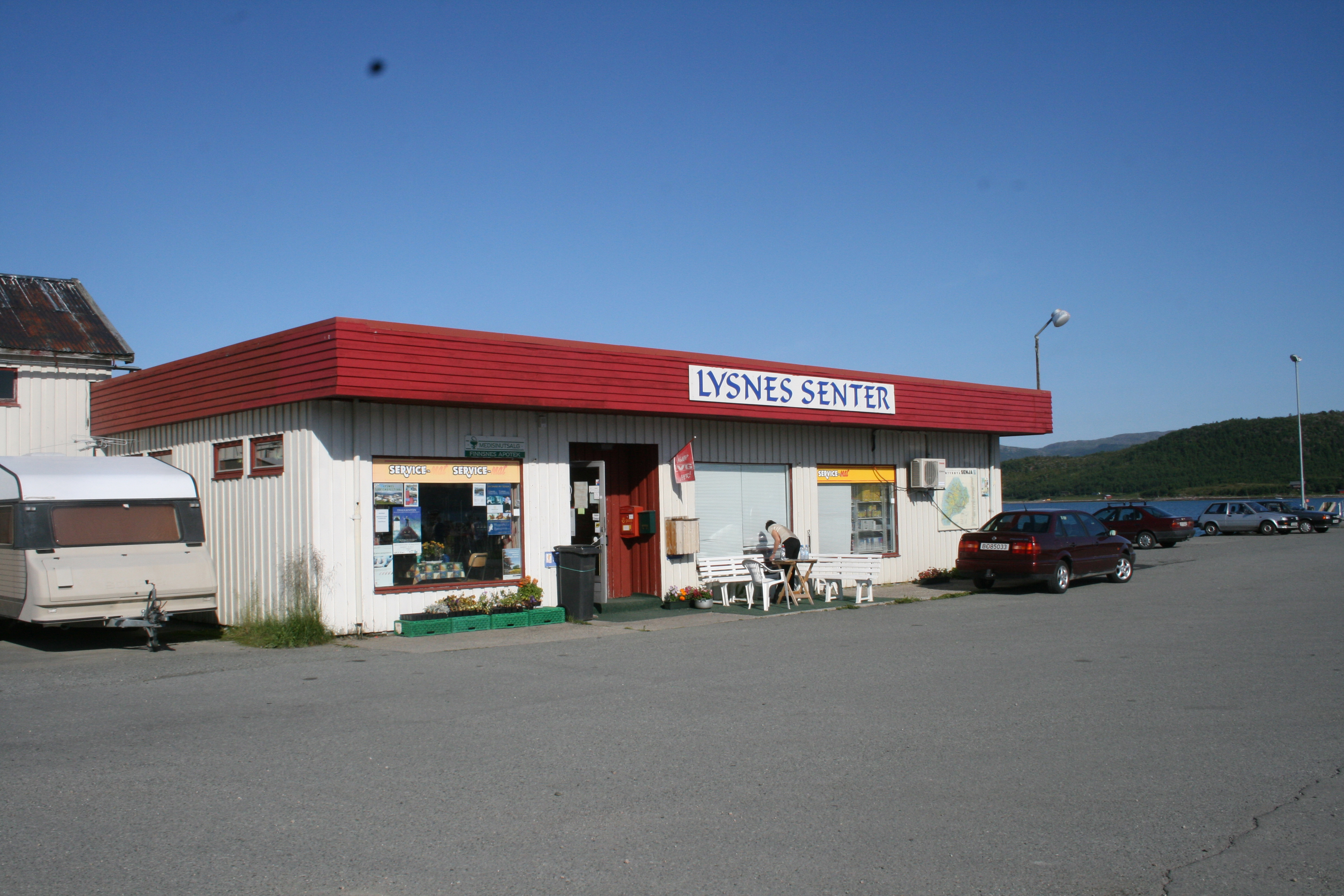 Lysnes senter på Senja